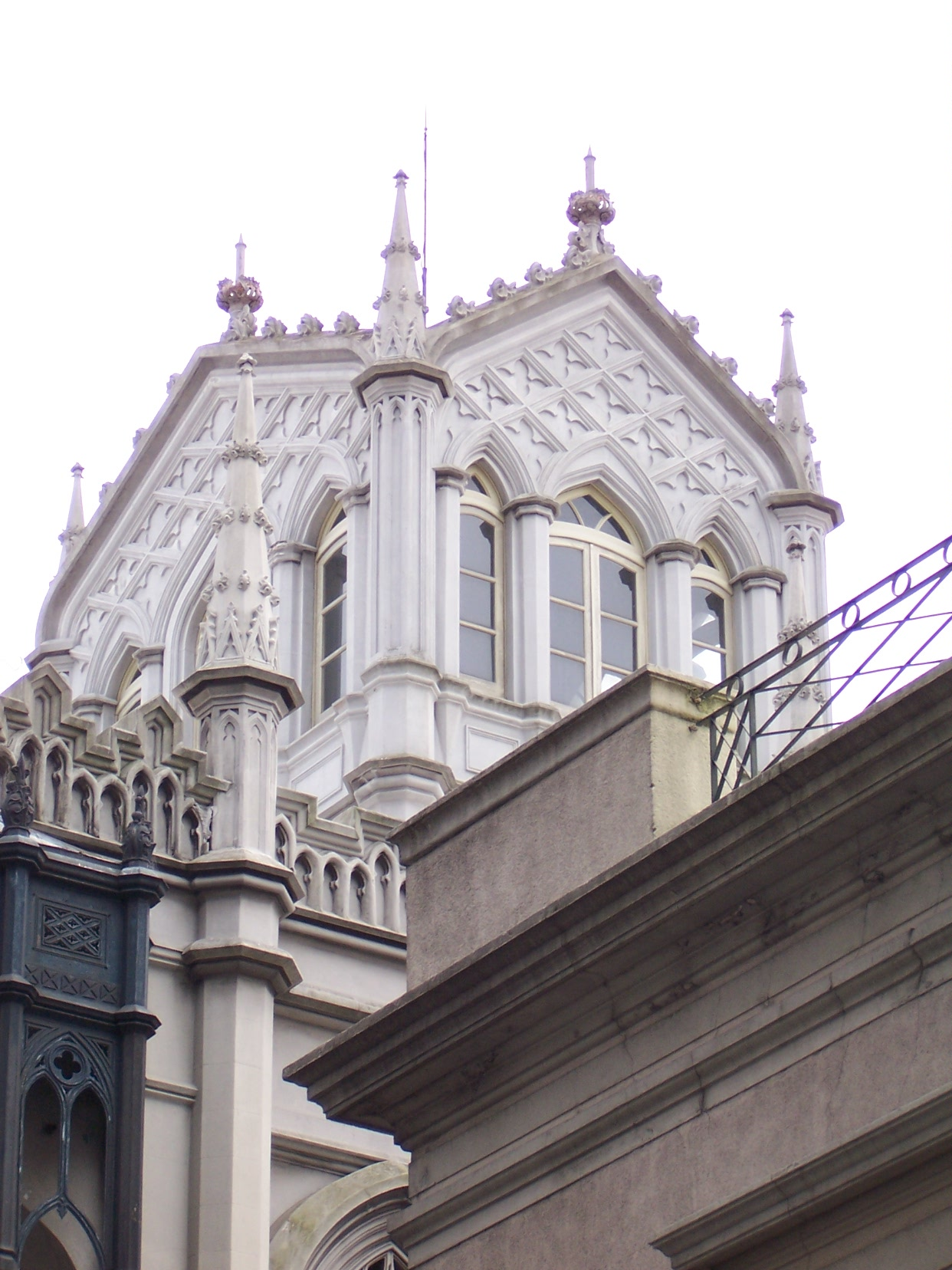 Casa de don Francisco Gómez - Palacio Gómez - Sede de la Junta Departamental de Montevideo. Ubicada en el departamento de Montevideo